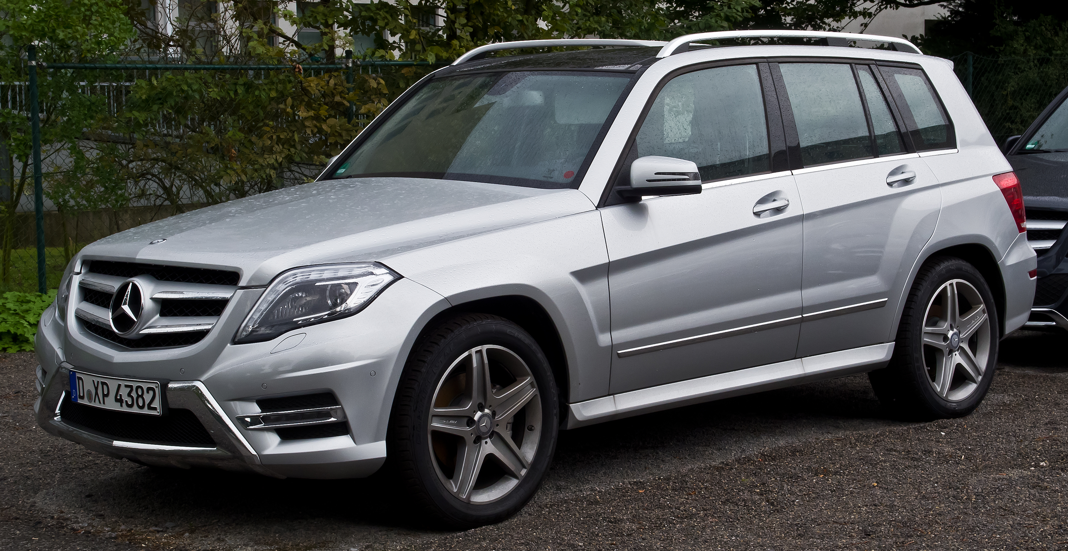 Mercedes-Benz GLK 220 CDI 4MATIC Sport-Paket AMG (X 204, Facelift)